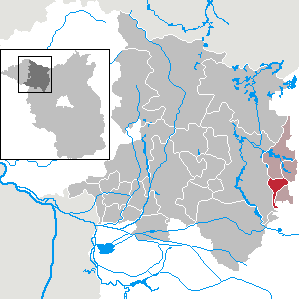 Herzberg (Mark) in Brandenburg (Country) - District Ostprignitz-Ruppin